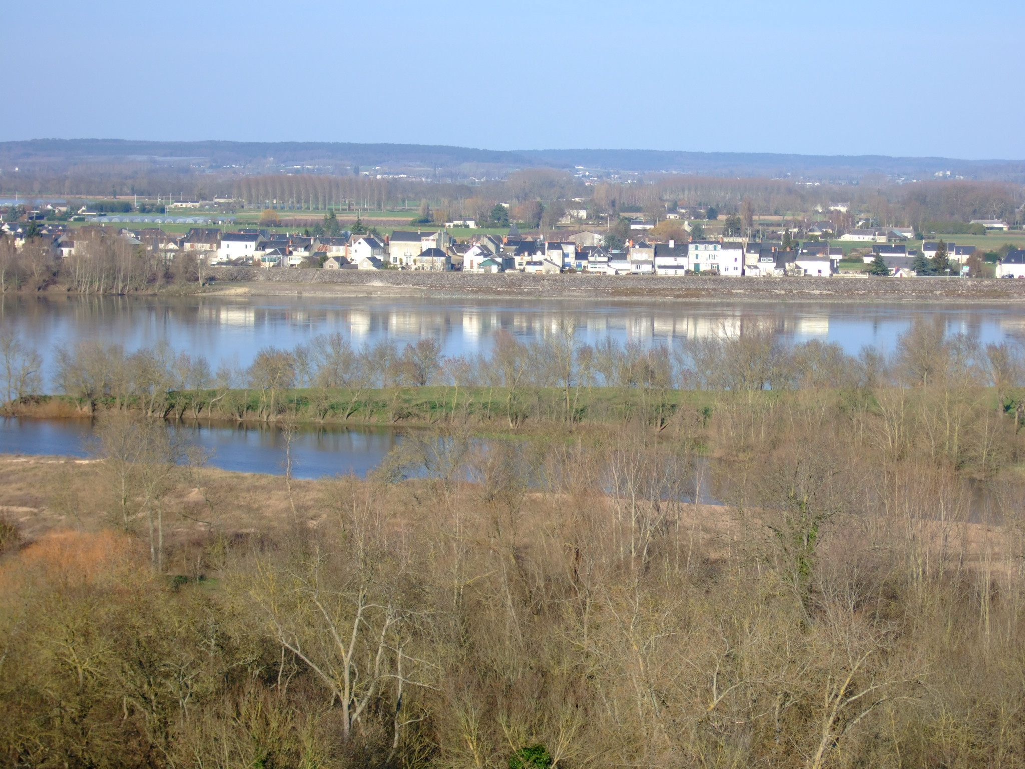 Vue générale de Villebernier